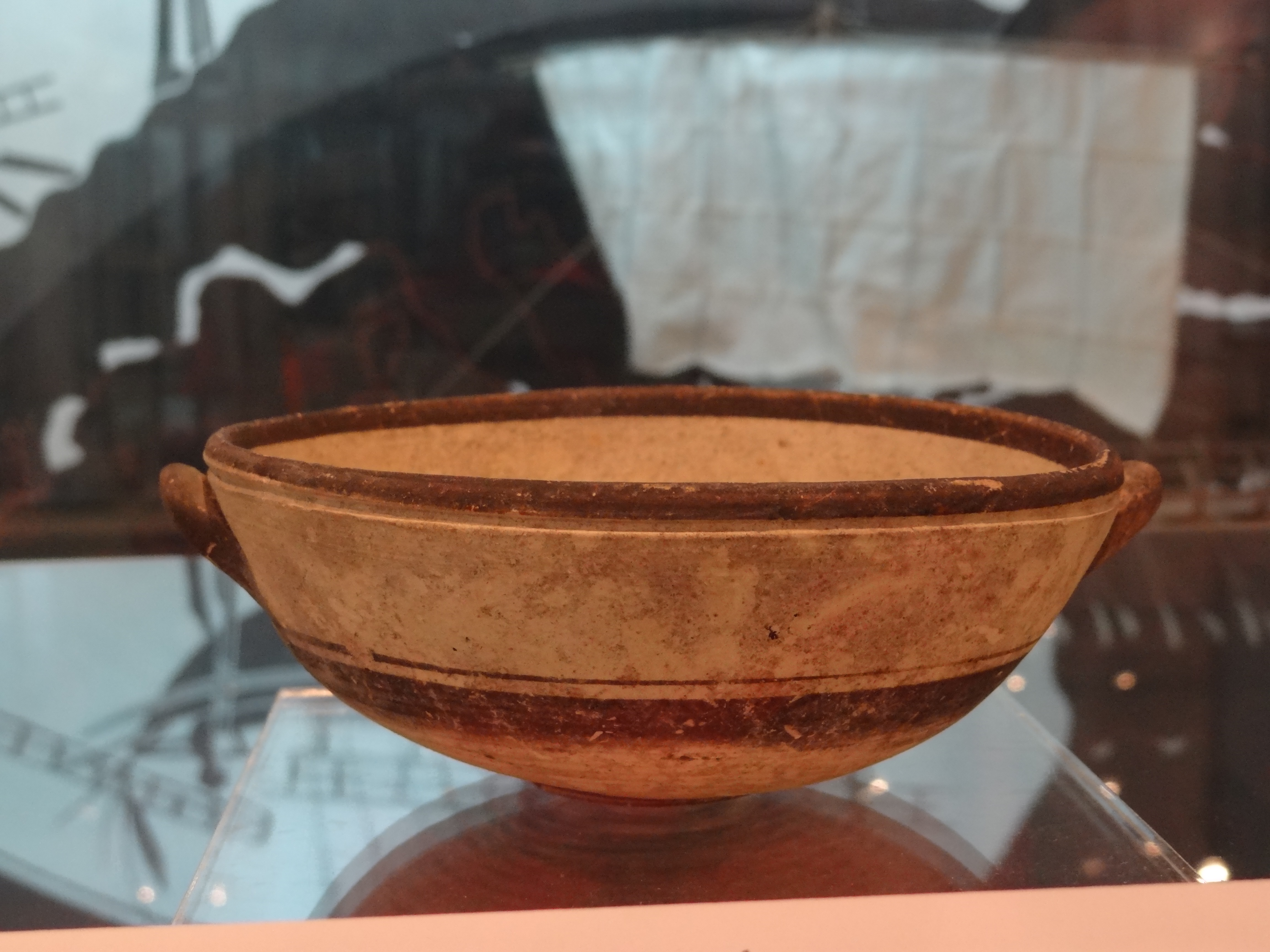 Cypriotic White Painted Ware from Iron Age, Israeli National Maritime Museum, Haifa משפחת כלים "המצויירים על לבן" מתקופת הברזל . כלים אלה נמצאו מחוץ לקפריסין במכלולים מהמאה ה11 וה-10 לפני הספירה אוסף המוזיאון הימי הלאומי קערה קבוצת הכלים המצויירים לבן 1